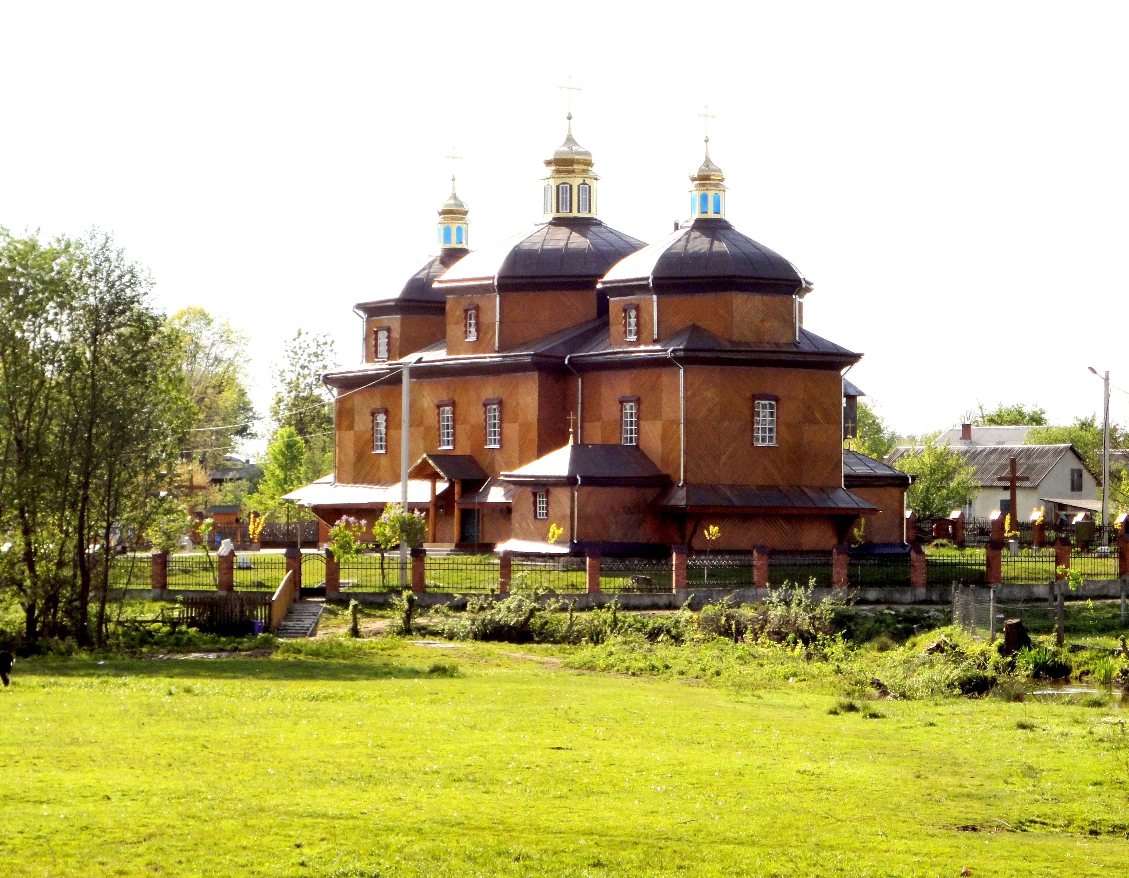 На фотографії Церква Різдва Пресвятої Богородиці, яка чарує своїм силуетом і неповторною красою. Церква має давню історію починаючи з XVIII ст.